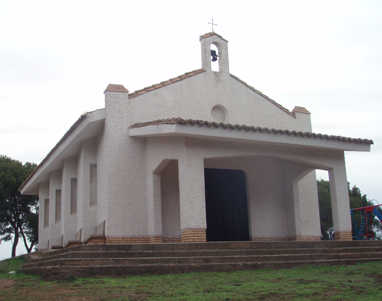 Ermita de Santa Quiteria de Tudela, en 2009